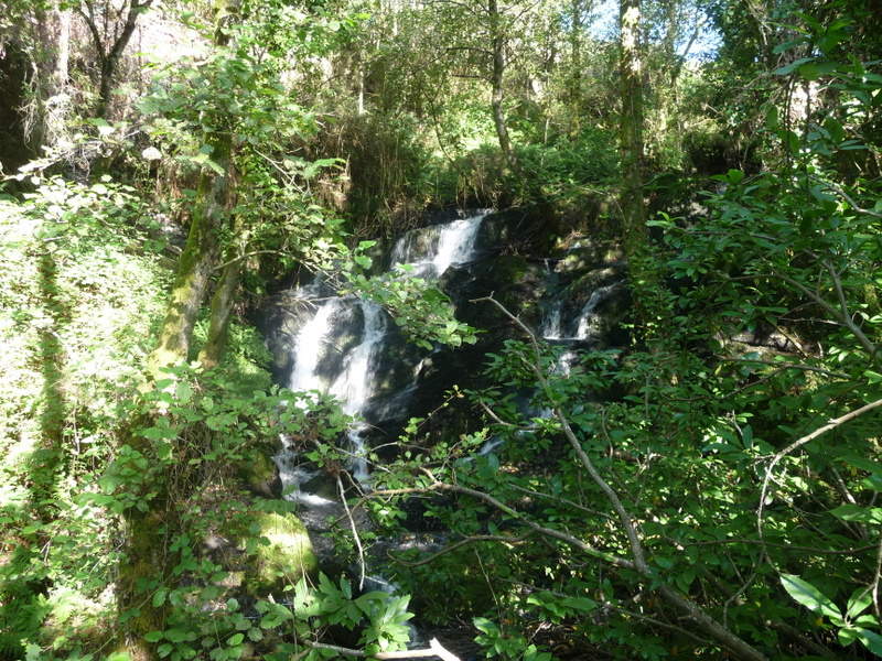 FERVENZA RÍO MENDO